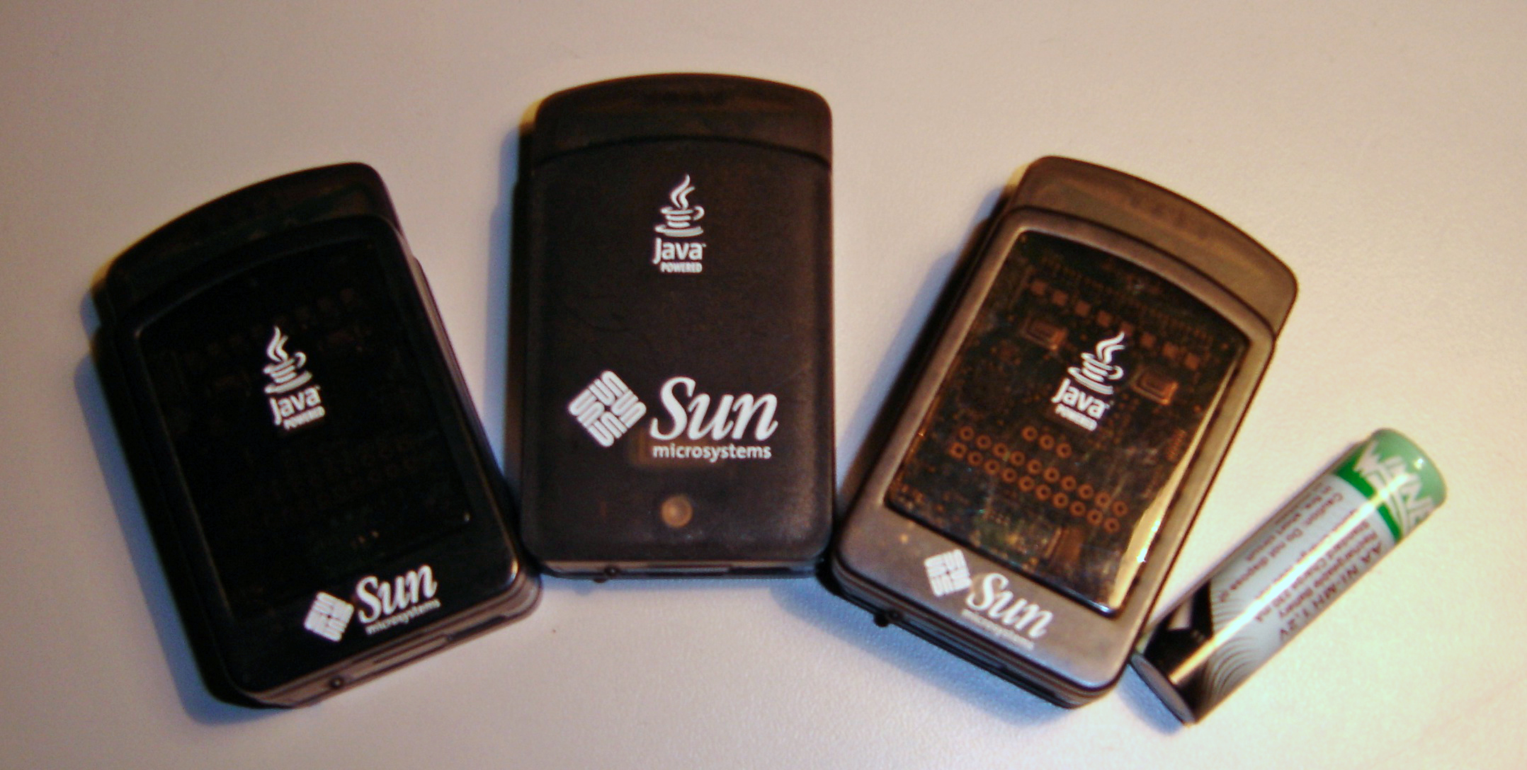 Sun SPOT, ICTP, Italy